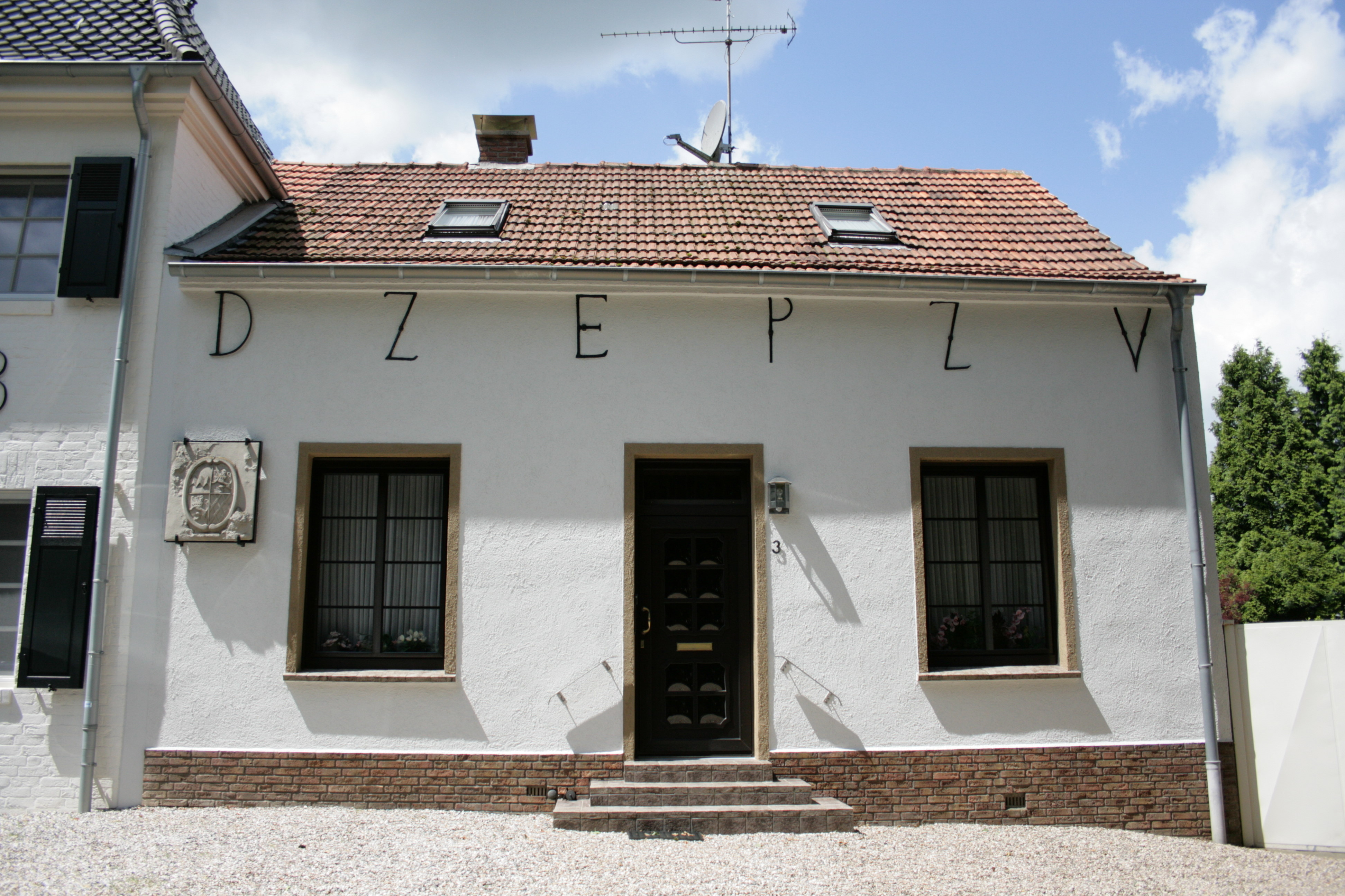 Freiheit, Hochelten Emmerich am Rhein